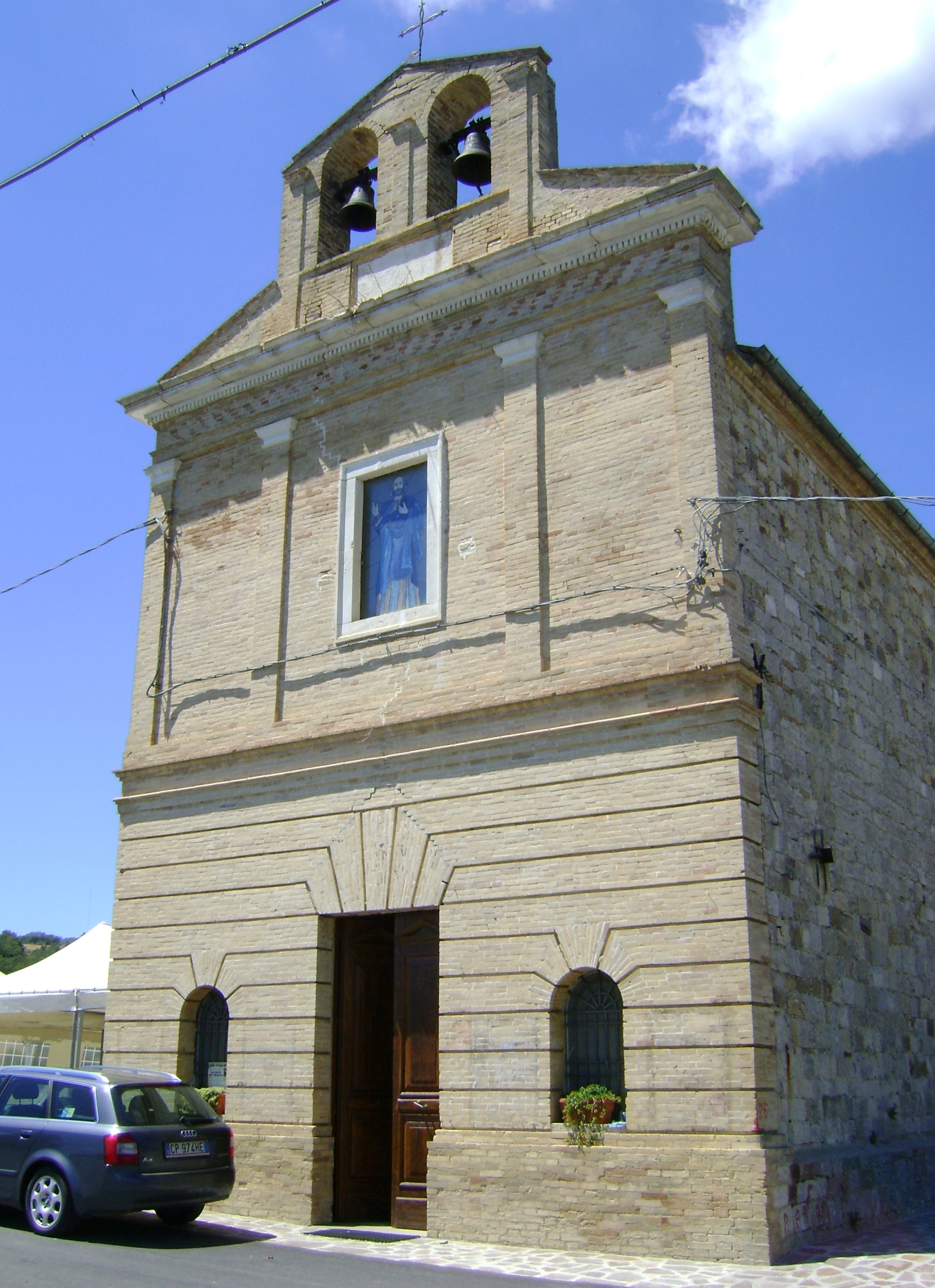 Chiesa di San Marco. Atessa, Chieti. Anno 1896.